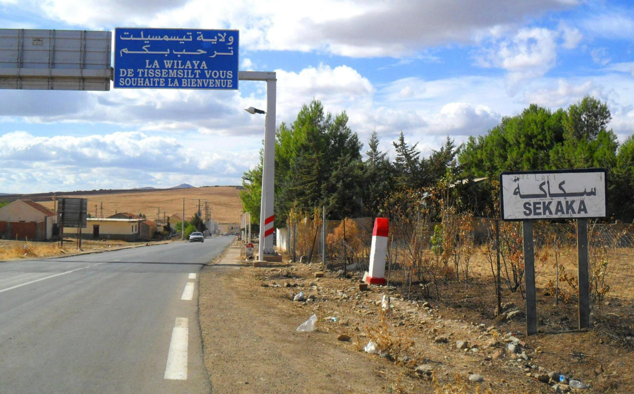 Village de Sekaka, commune de Bordj Emir Abdelkader dans la wilaya de Tissemsilt, frontières avec la wilaya de Médéa قرية سكاكة بتيسمسيلت على الحدود مع ولاية المدية